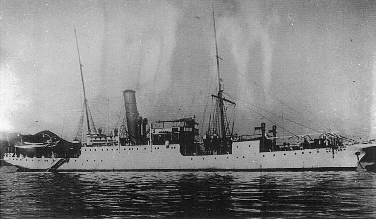 小笠原丸